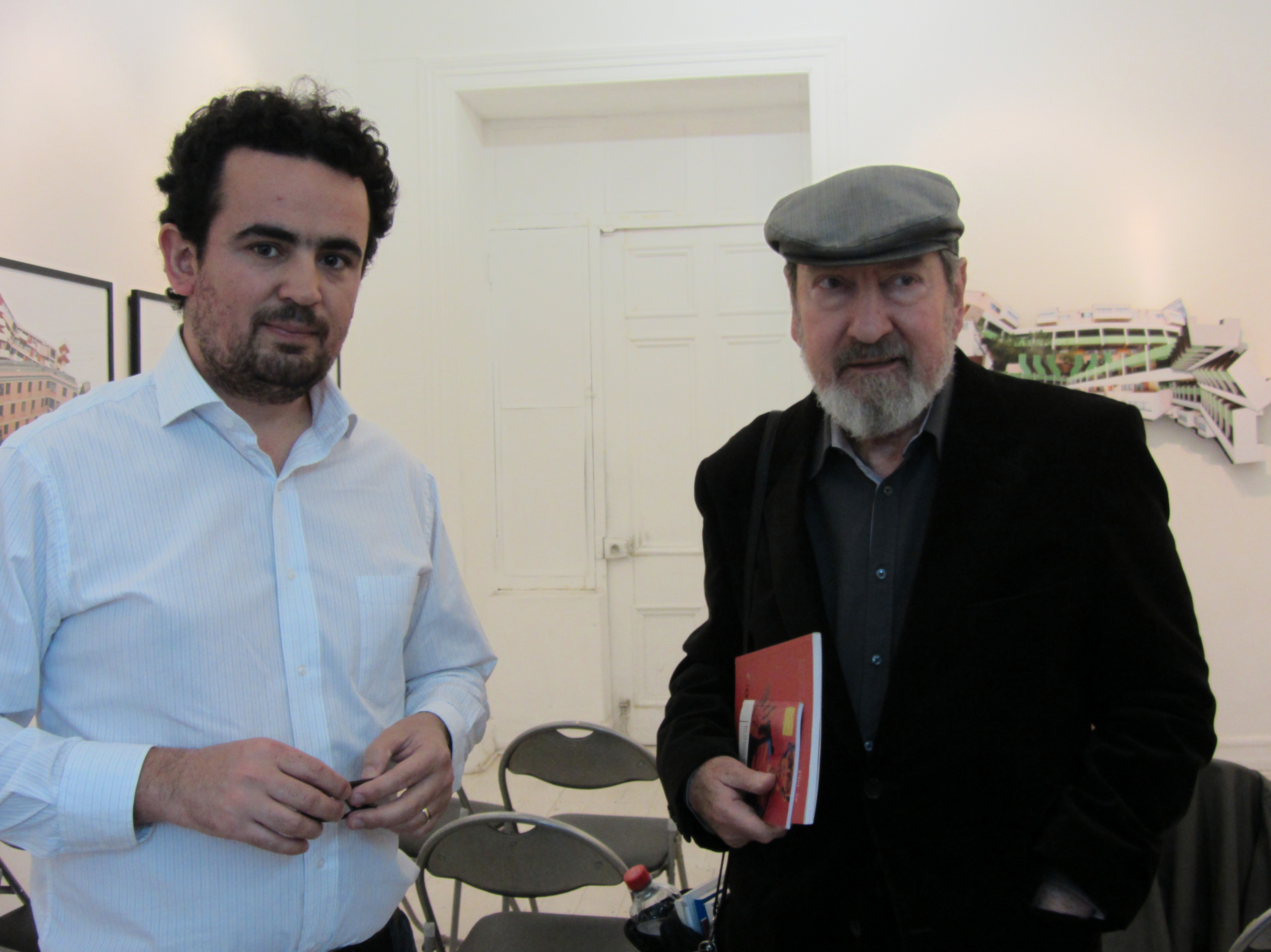 El editor chileno Ernesto Pfeiffer y Manuel Silva Acevedo durante una lectura poética de este último en la librería Metales Pesados de Valparaíso el 27 de noviembre de 2015